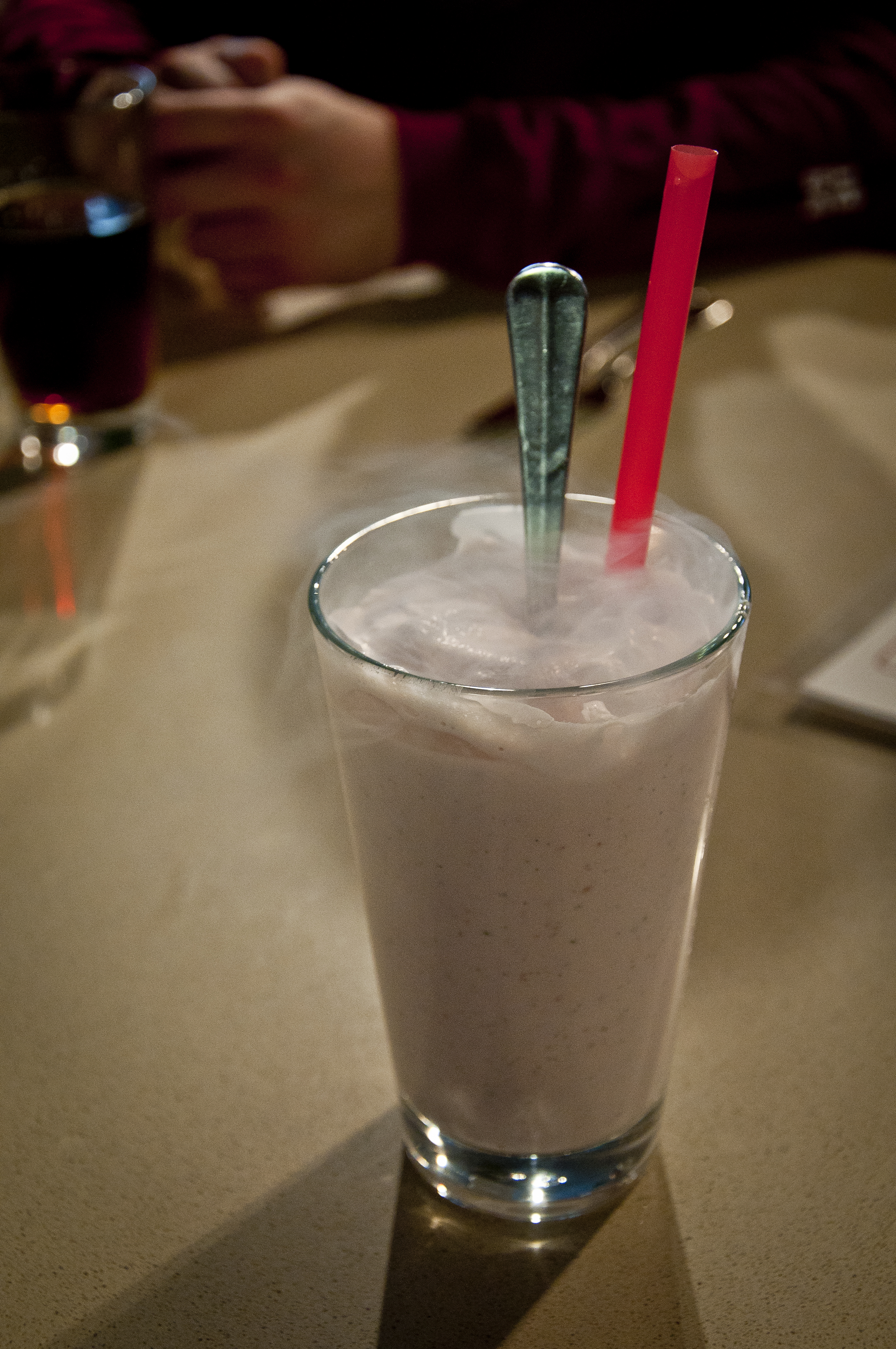 Strawberry-Mint Liquid Nitrogen Shake at H|Burger in Denver